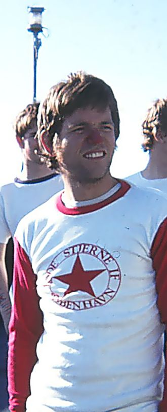 MF Steen Tinning (Venstresocialisterne) ombord på det danske inspektionsskib F348 Hvidbjørnen umiddelbart før Polardåb. Juli 1984.